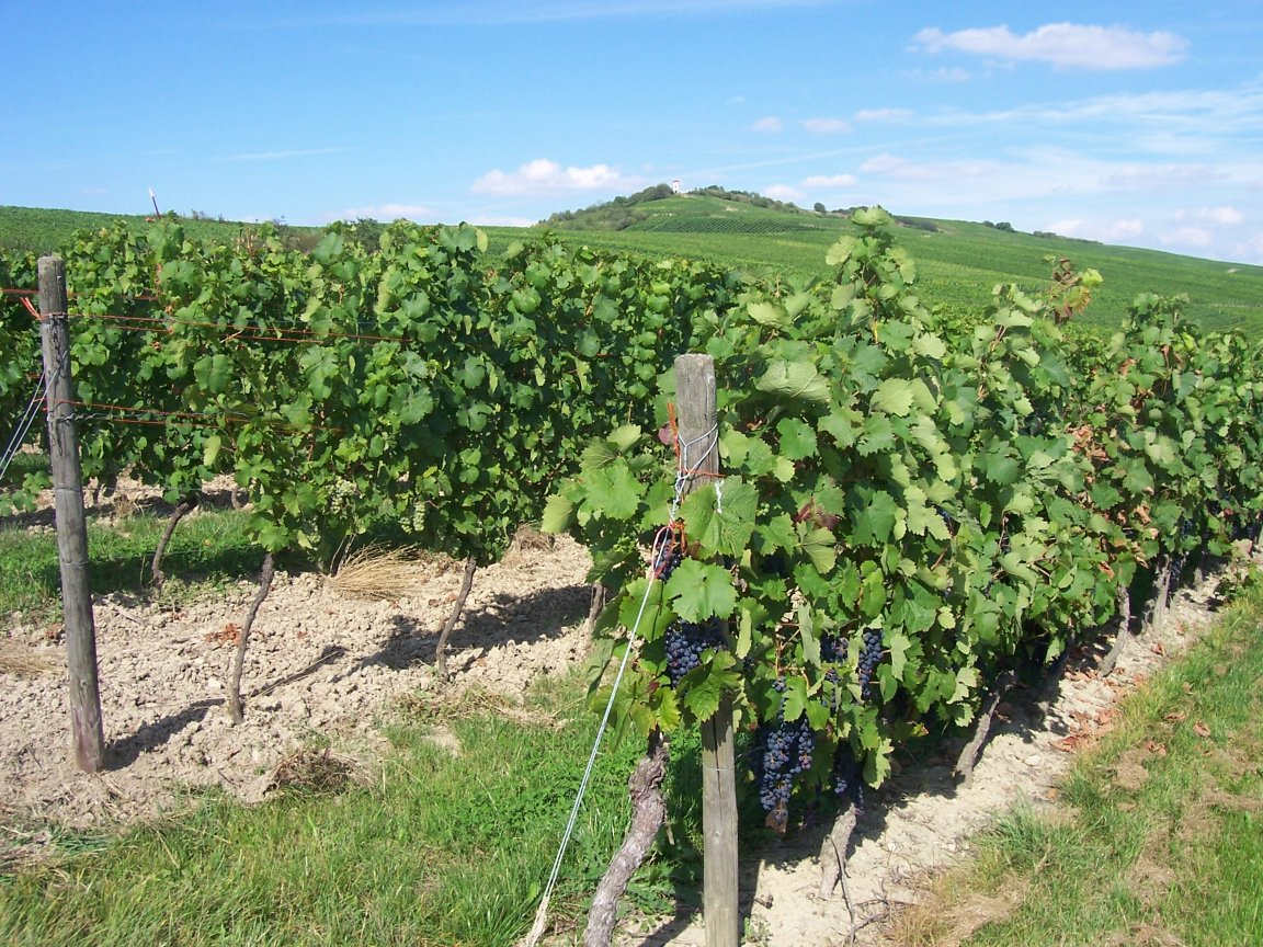 Vineyards near Stadecken-Elsheim, Rhenish Hesse, looking toward Hiebergturm.